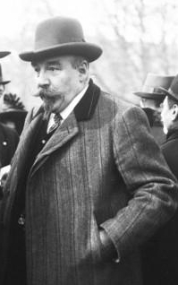 Le chansonnier Xavier Privas (1863-1927) au jardin du Luxembourg à l'occasion de l'anniversaire de Verlaine le 12 janvier 1913